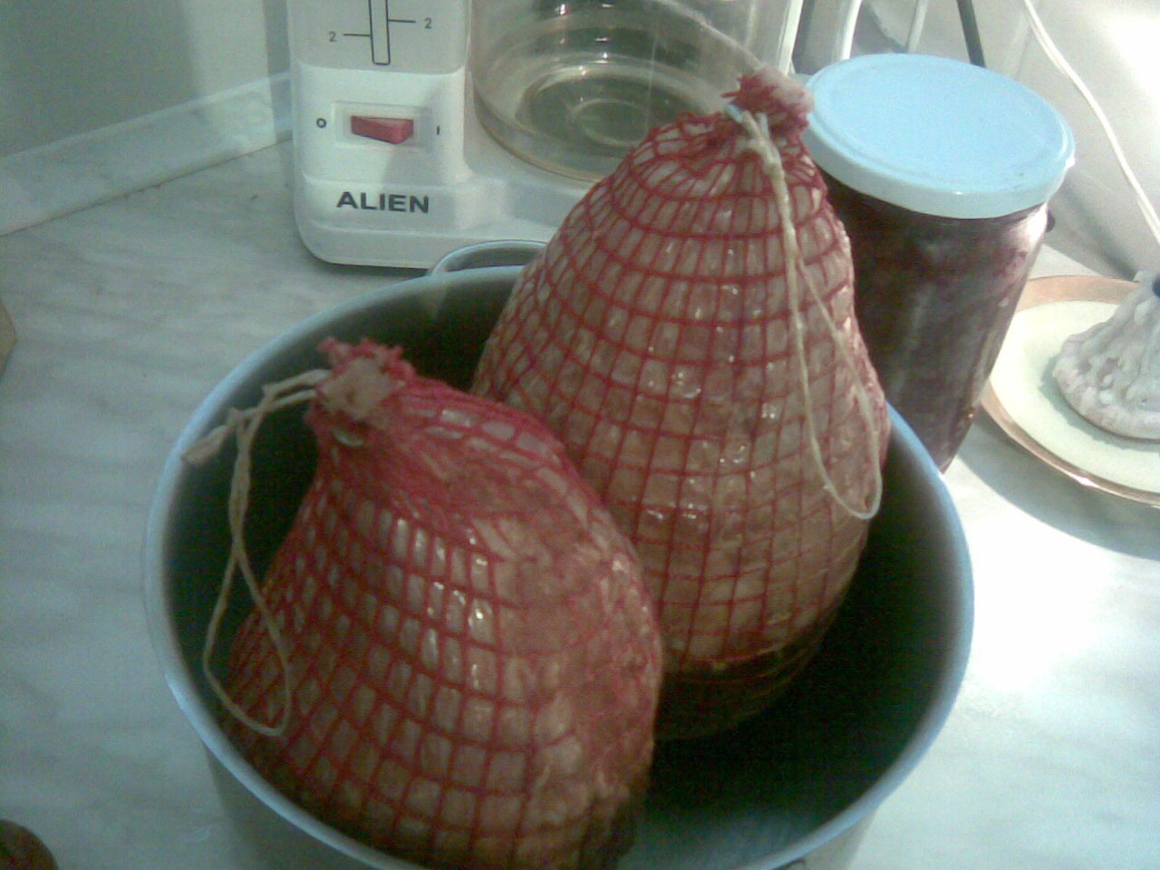 Veľkonočná šunka / Východné Slovensko